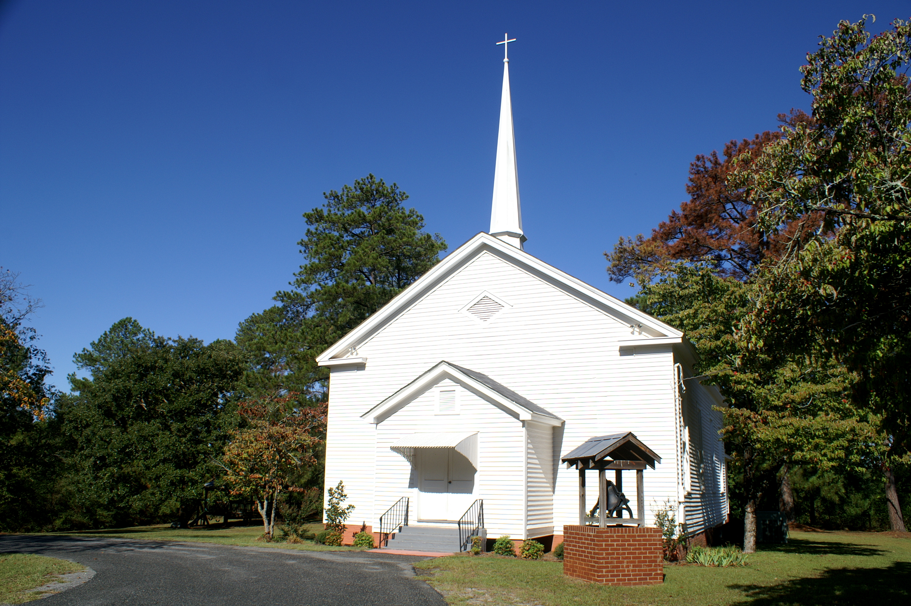 Sunshine Baptist Church